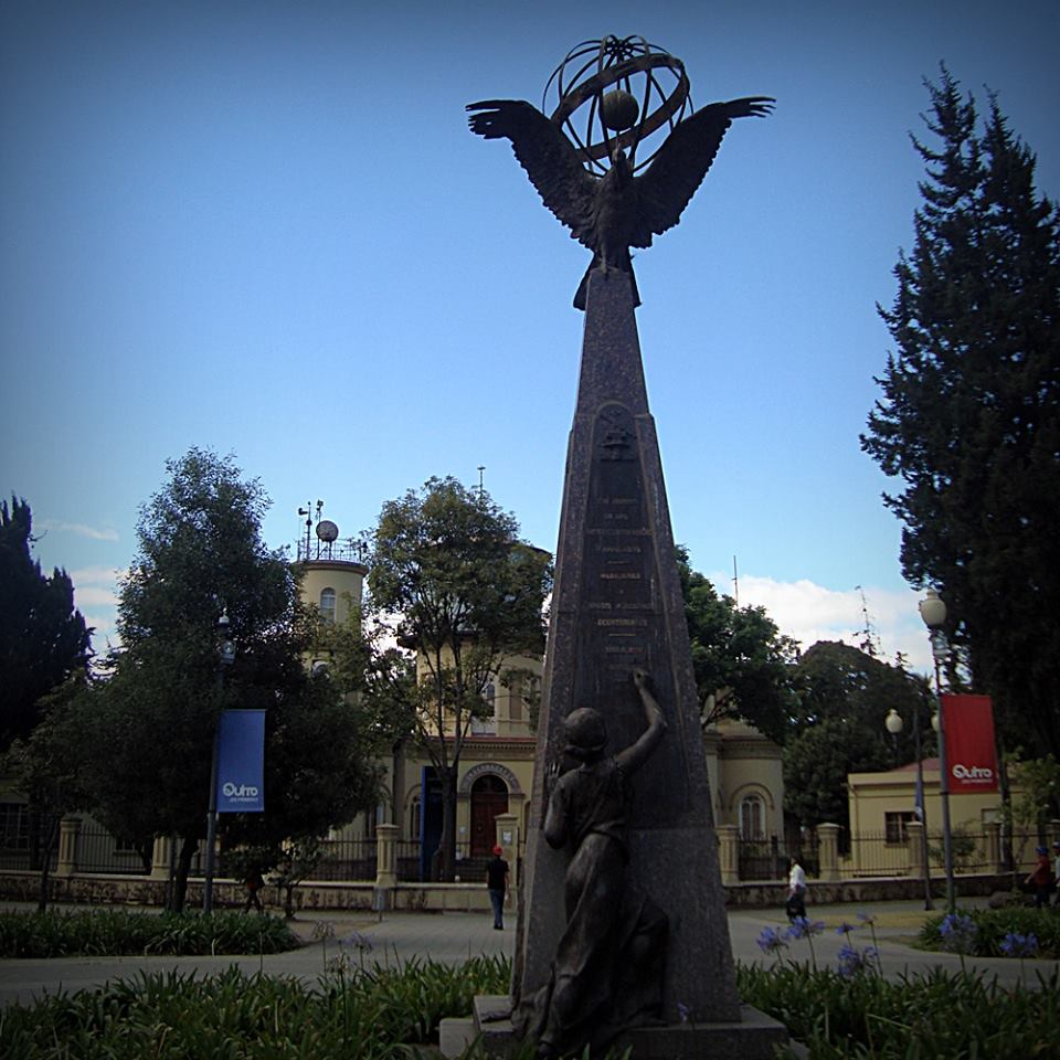 Vista del monumento a las Misión Geodésica de Francia en Quito, erigido en La Alameda de esa ciudad, frente al observatorio astronómico.